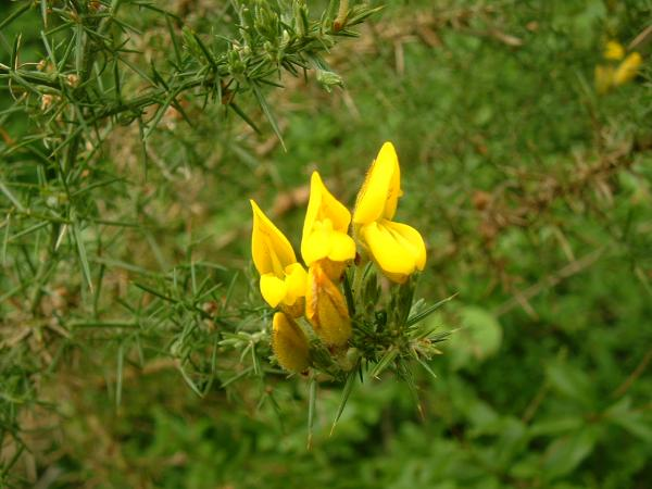 Ajonc d'Europe, Bucey-lès-Gy, mai 2004